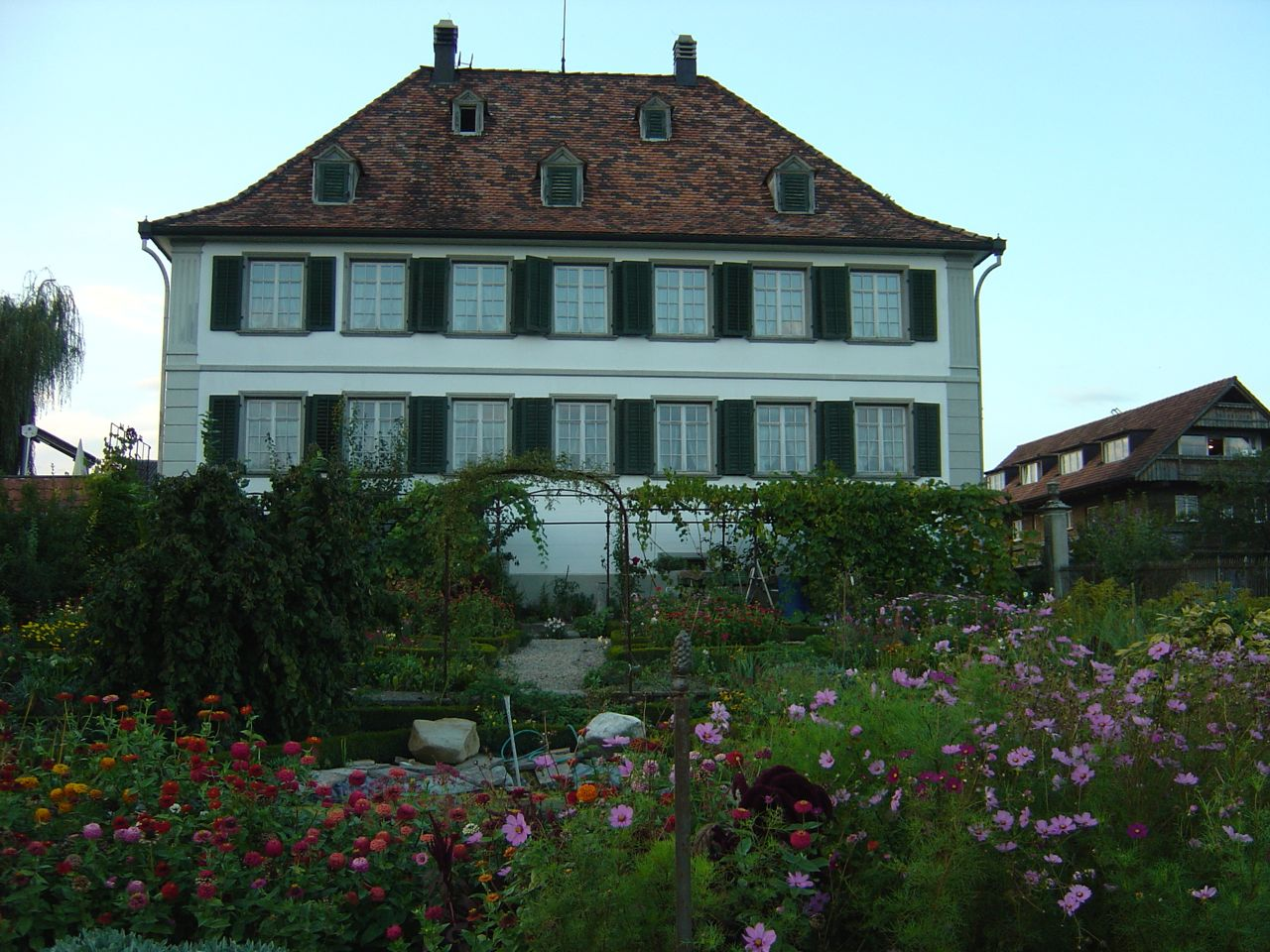 Dieser Landsitz wurde 1817 von Johan Altwegg erbaut und ist bis heute im Familienbesitz.